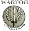 warfoglogo.gif